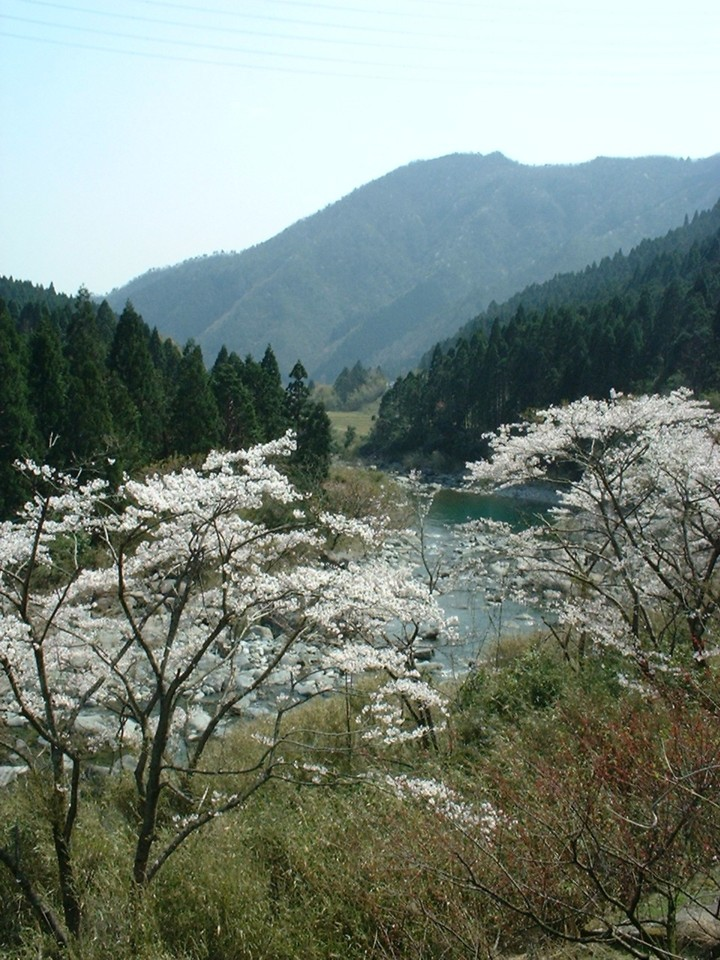 市川中流；桜の陰を流れる 兵庫県神崎郡ja:神河町（撮影当時は同郡大河内町長谷） 北緯35度5分23秒，東経134度44分16秒付近